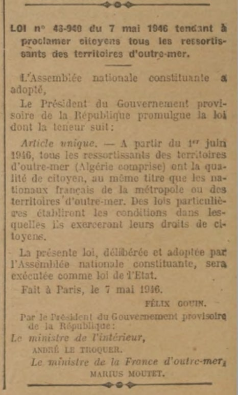 Loi 46-940 du 7 mai 1946 tendant à proclamer citoyens tous les ressortissants des territoires d'outre-mer.